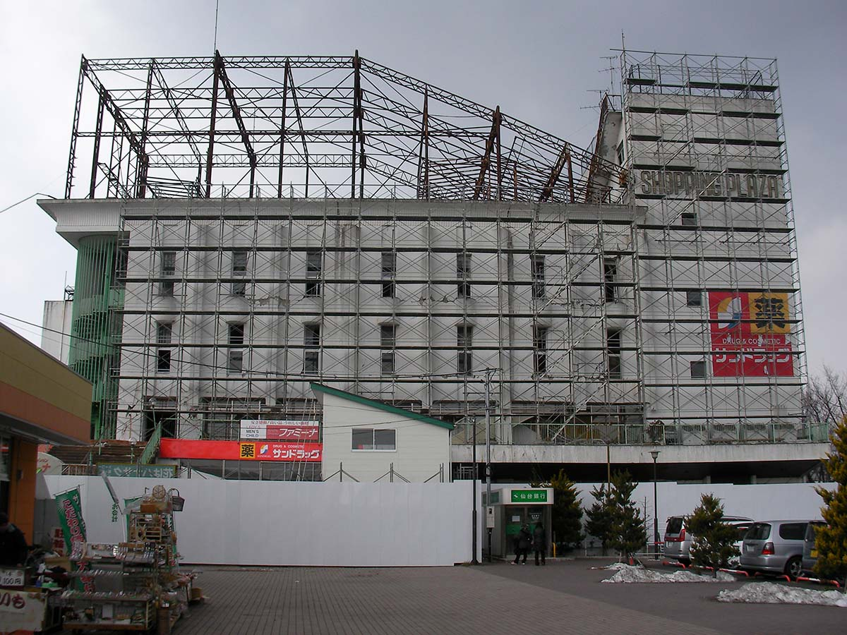 仙台市宮城野区鶴ケ谷ショッピングセンター付近にて撮影